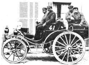 Ernest Archdeacon au Paris-Marseille-Paris 1896 (Delahaye à pneumatiques Michelin) - Histoire de l'Automobile, 1907 (éd. H. Dunod et E. Pinat) ASIN: B001BPBE58 p.317